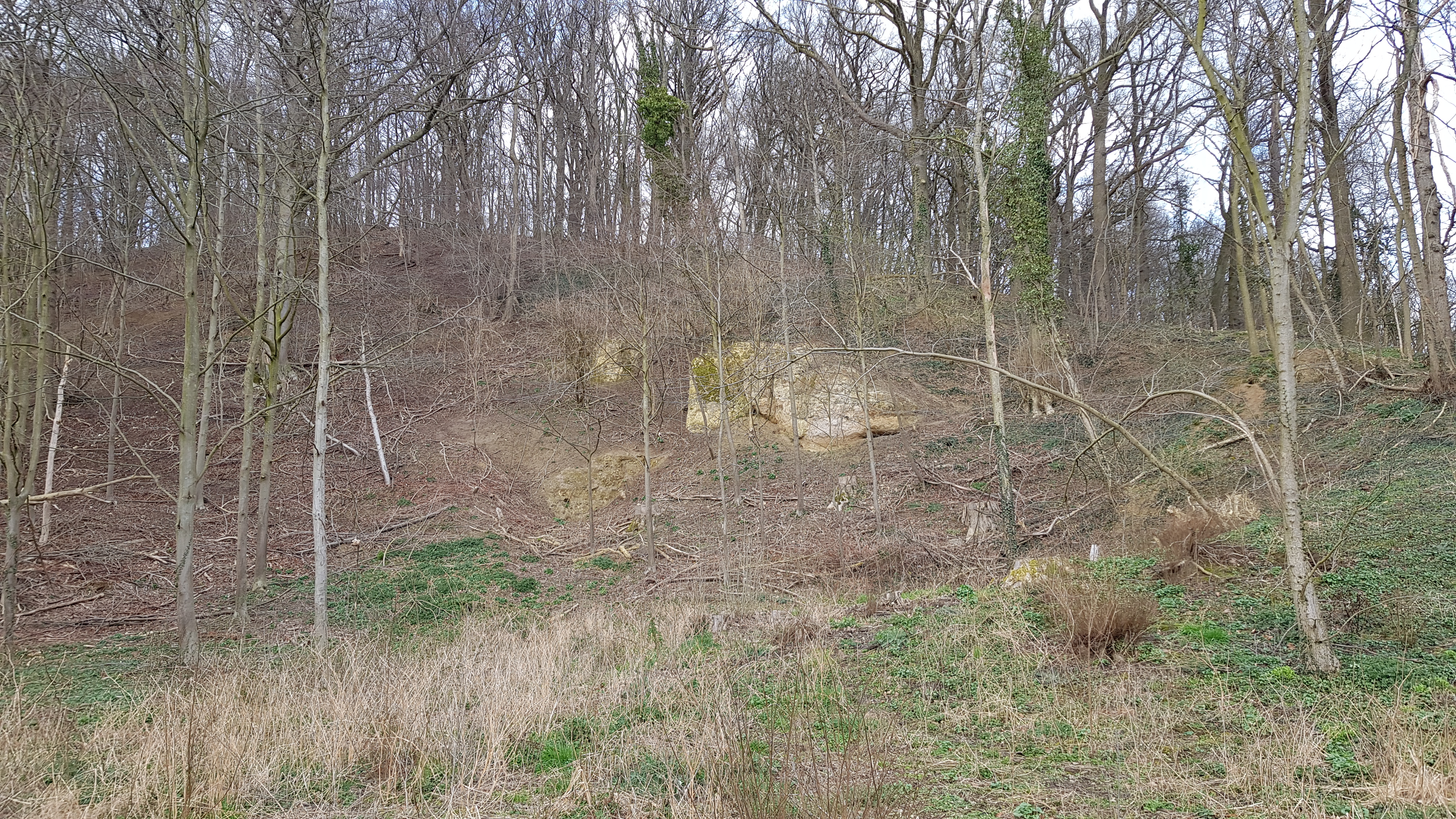 Bunderberggroeve, Cadier en Keer, Nederland